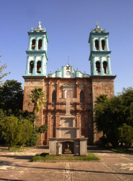 Catedral de Fray Juan Bautista Moya en Ciudad Altamirano, Guerrero, México.